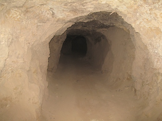 تصویری از غار شهرخنجین